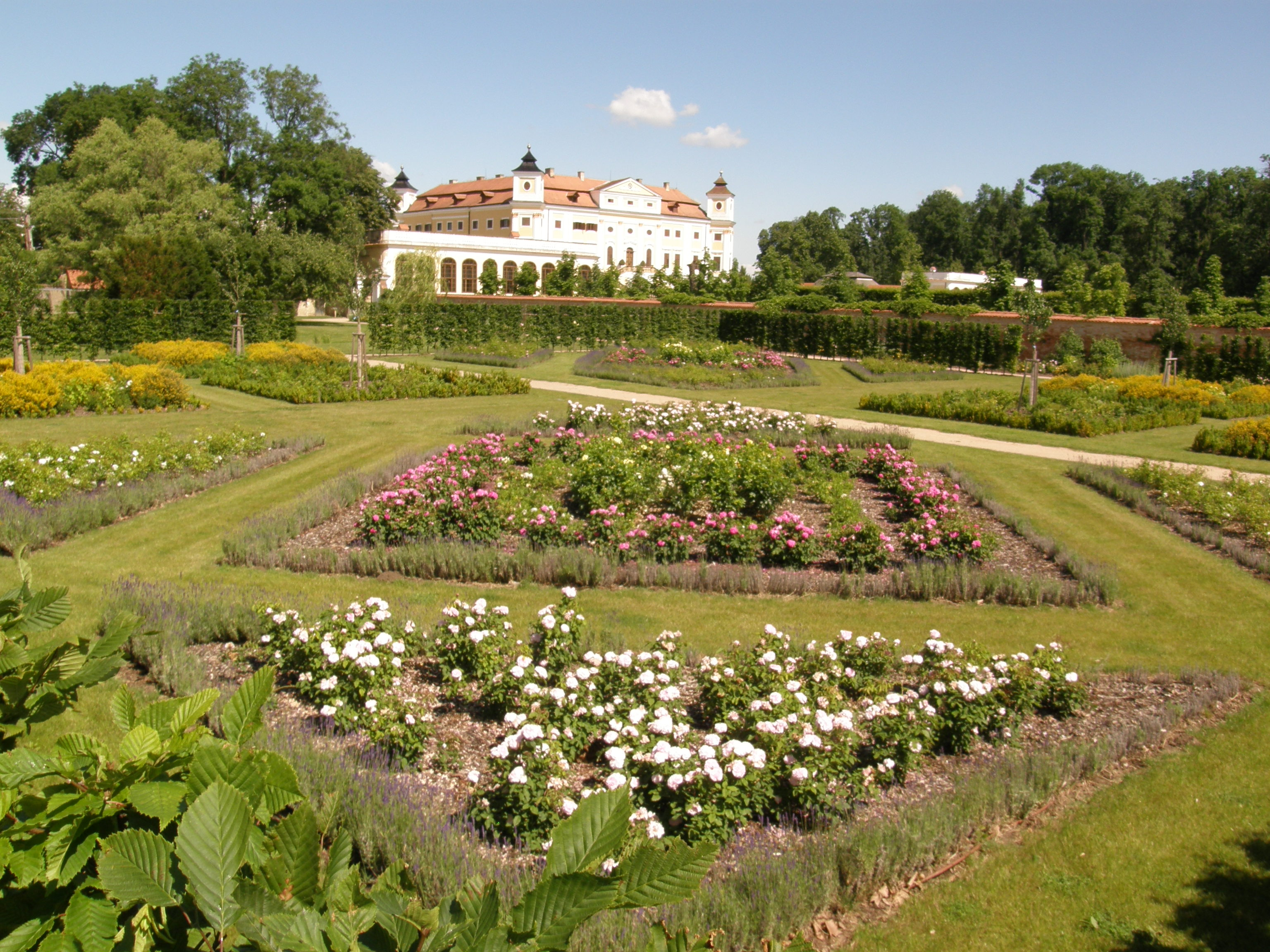 Zásobní zahrada zámku v Miloticích zrekonstruovaná v roce 2013. Foto: Roman Krejča.